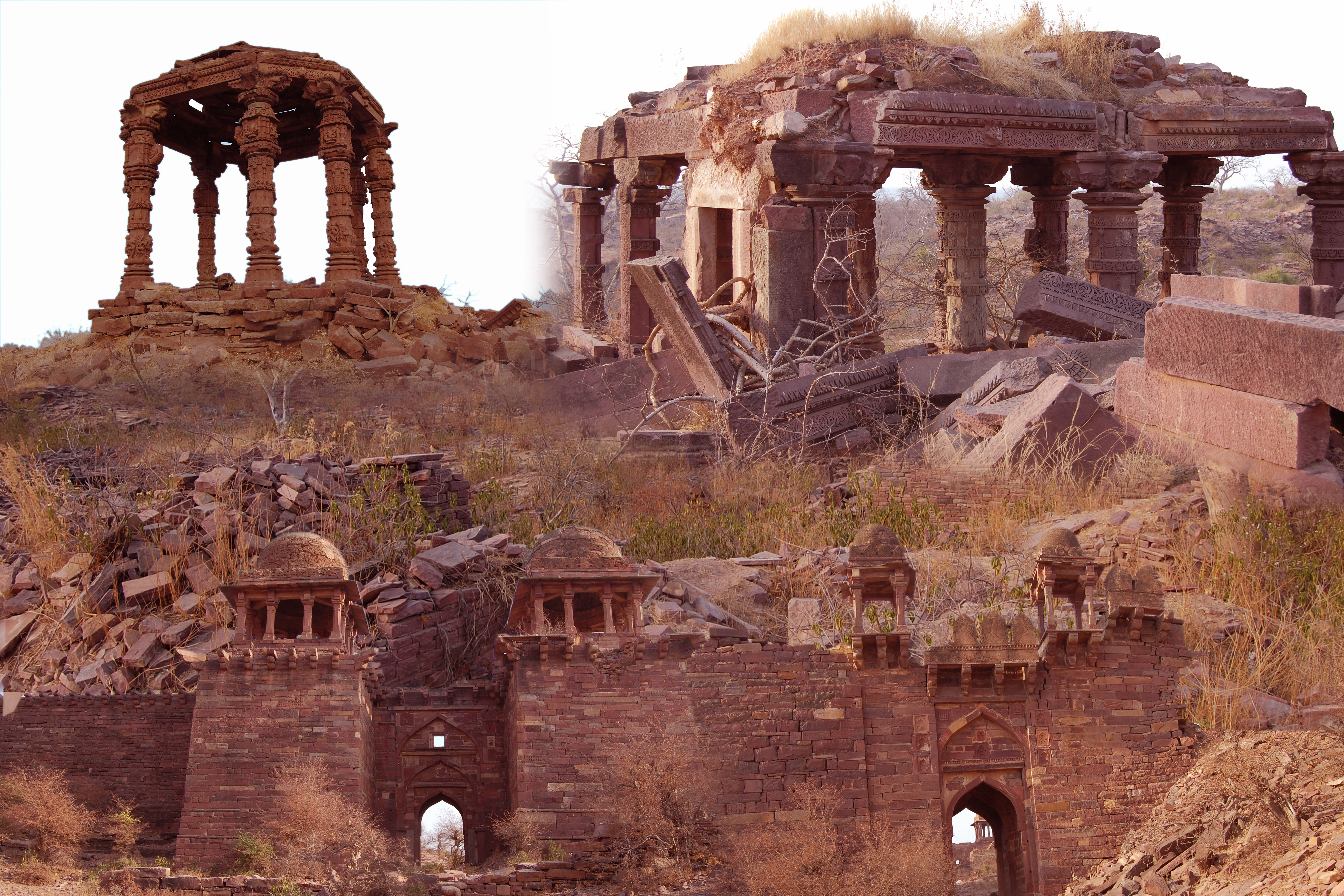 तिमंगढ़ किला करौली राजस्थान